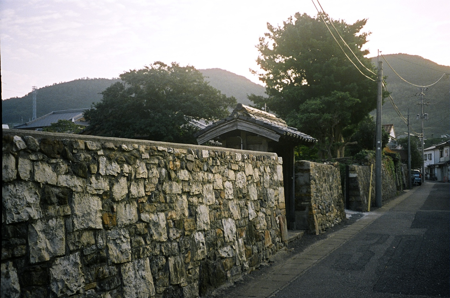 対馬市厳原町、旧対馬藩時代より残る武家屋敷の石垣